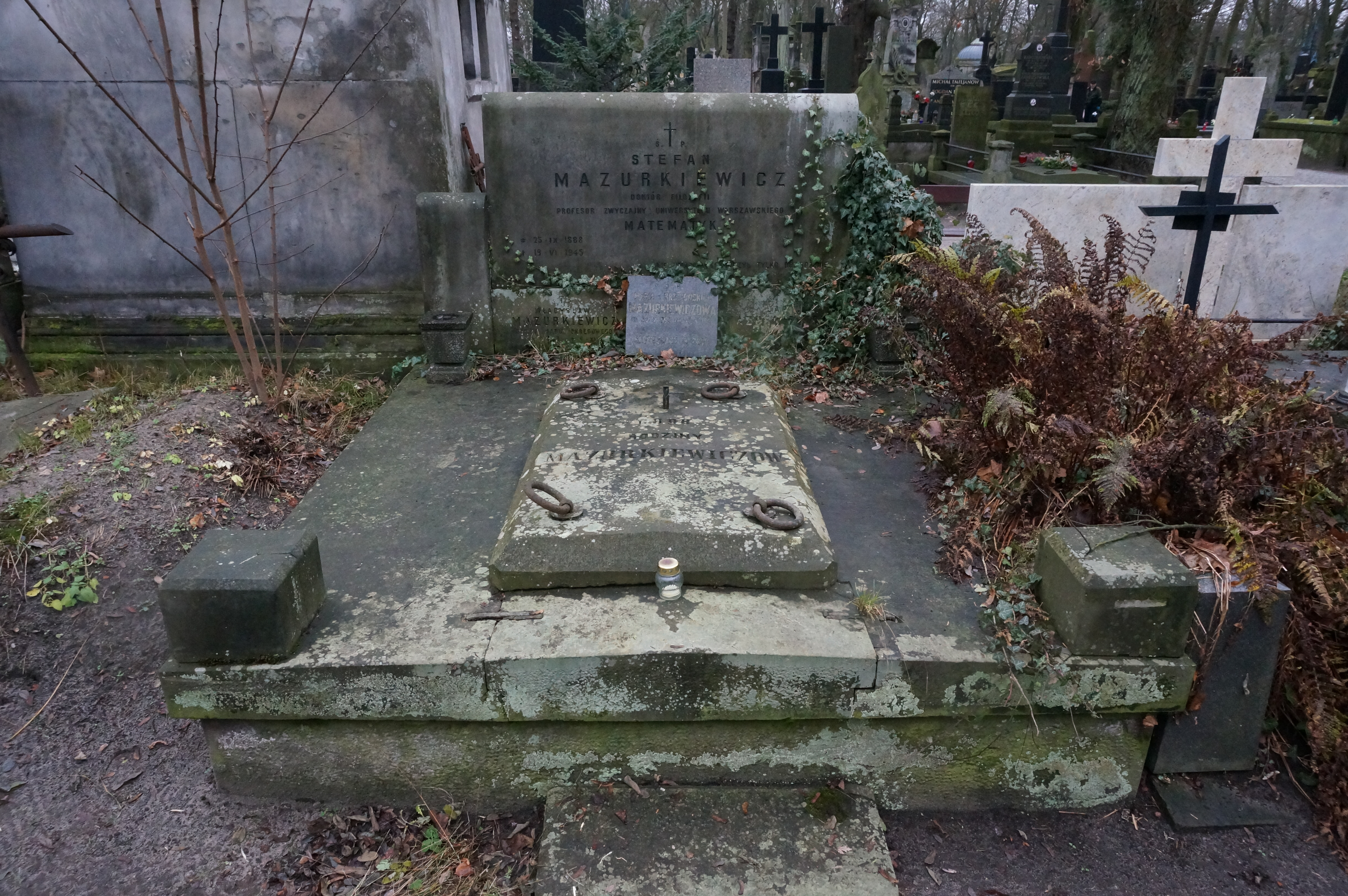 Grób Stefana Mazurkiewicza na Cmentarzu Powązkowskim (kwatera 41, rząd 2, grób 24, 25)